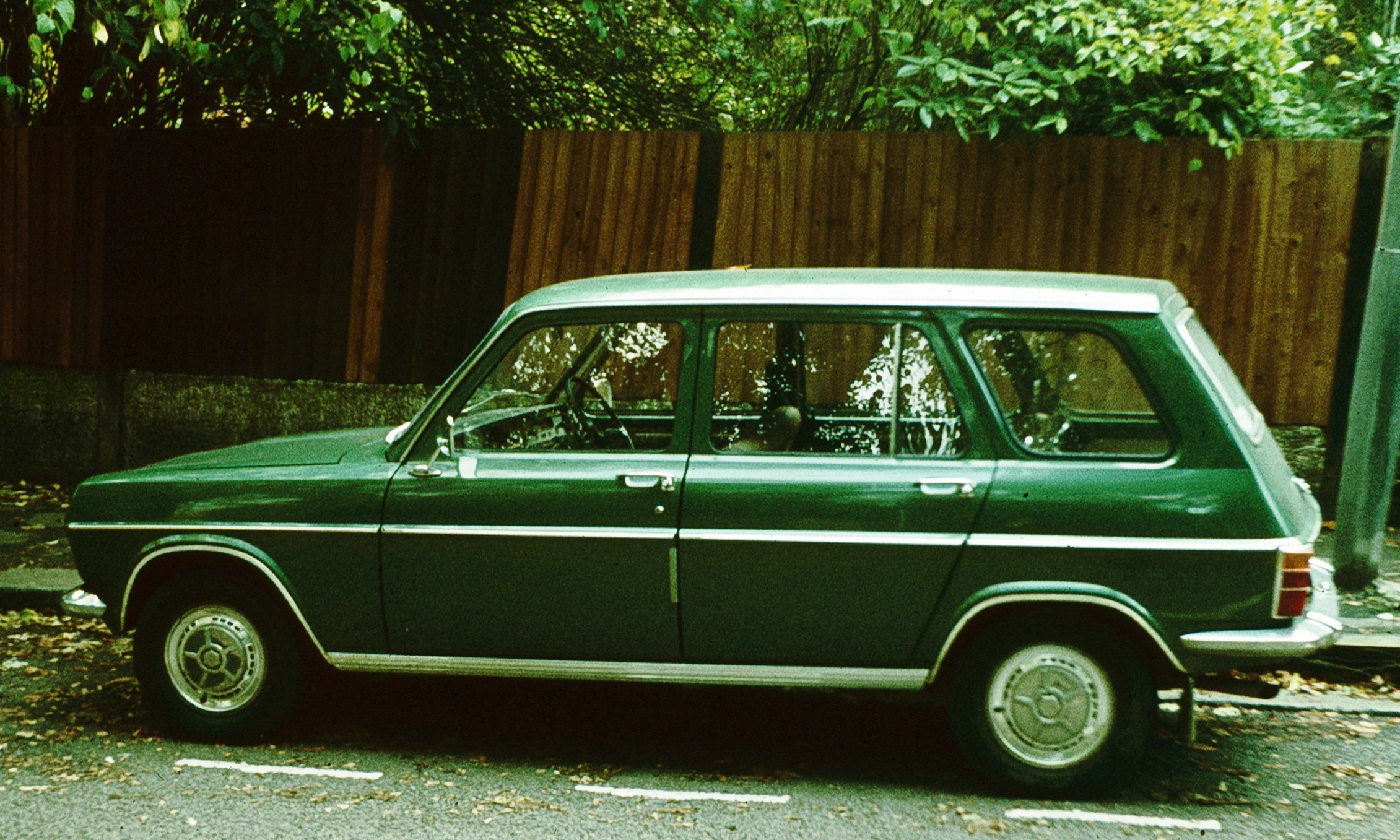 Simca 1100 Break Seitenansicht